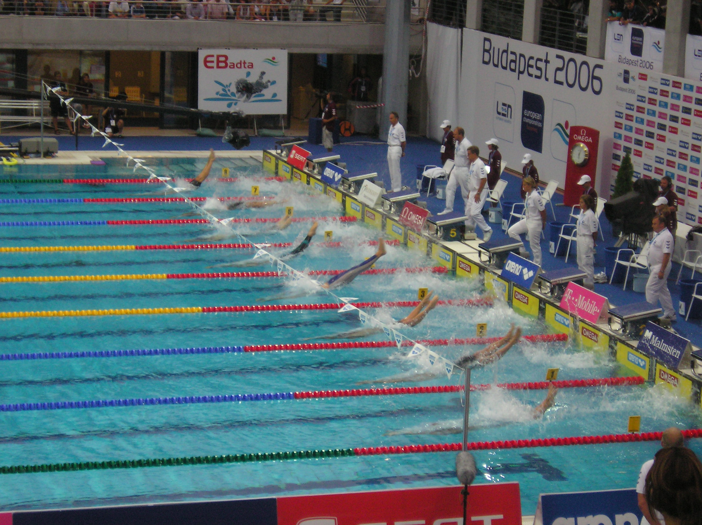 Start finale 50 meter rugslag mannen tijdens het EK Zwemmen 2006 in Boedapest. Goud: Helge Meeuw (baan 3); Zilver: Aristeidis Grigoriadis (baan 4); Brons: Matthew Clay (baan 5)